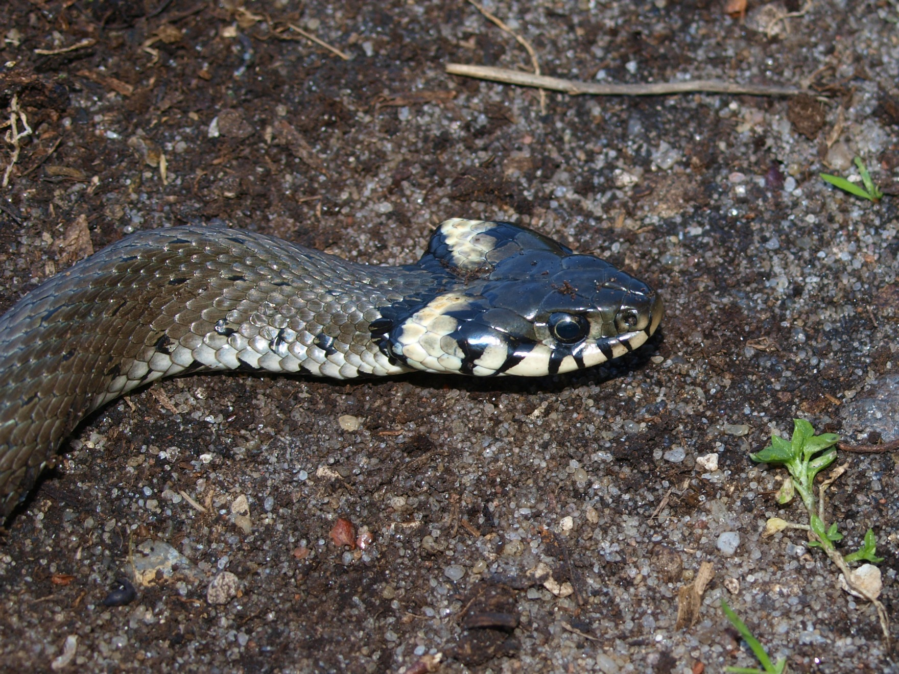 Pildil harilik nastik Natrix natrix